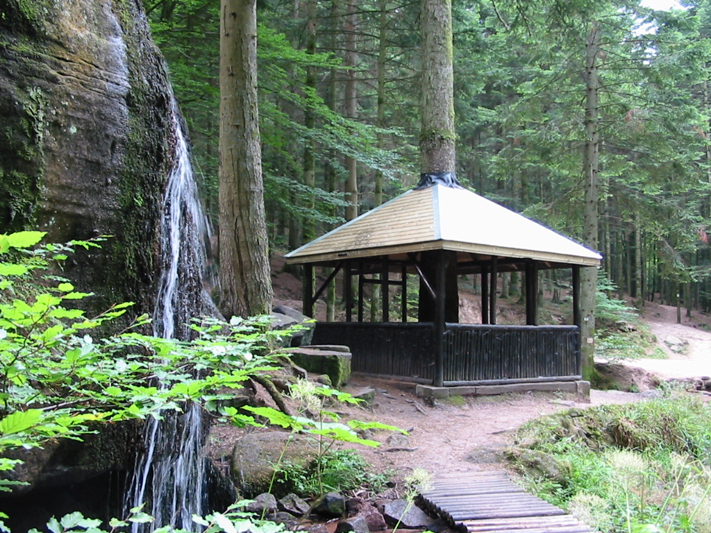 Cascade et kiosque des Molières, dans le massif de l'Ormont, dans le haut bassin du Robache.